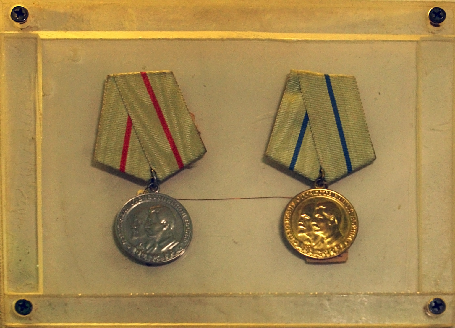 МЕДАЛЬ „ПАРТИЗАНУ ОТЕЧЕСТВЕННОЙ ВОЙНЫ" I и II СТЕПЕНИ. Учреждена Указом Президиума Верховного Совета СССР от 2 февраля 1943 г. Военно-исторический музей артиллерии, инженерных войск и войск связи, Санкт-Петербруг.